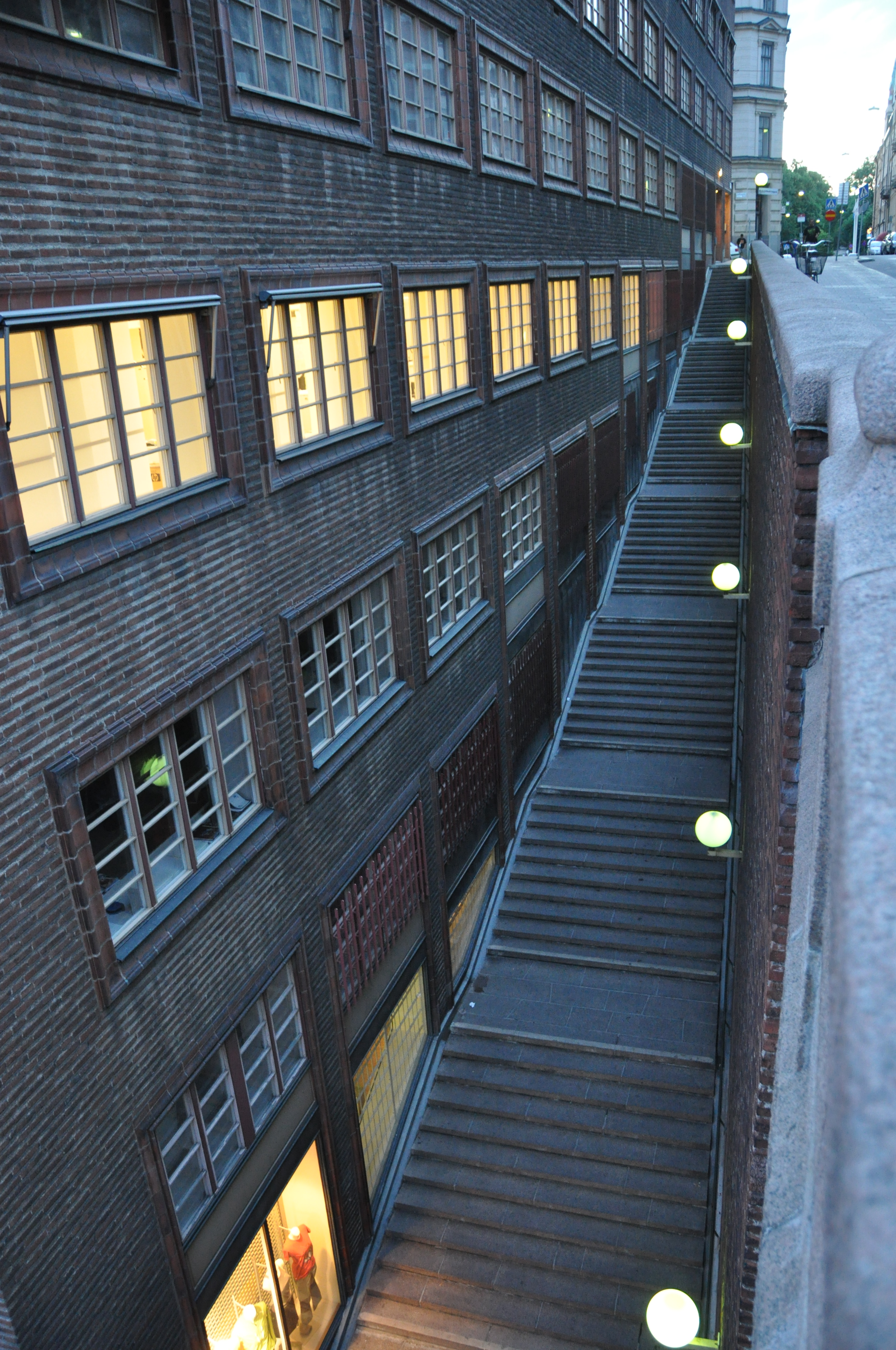 Malmskillnadstrappan sedd från malmsillnadsbron, Stockholm